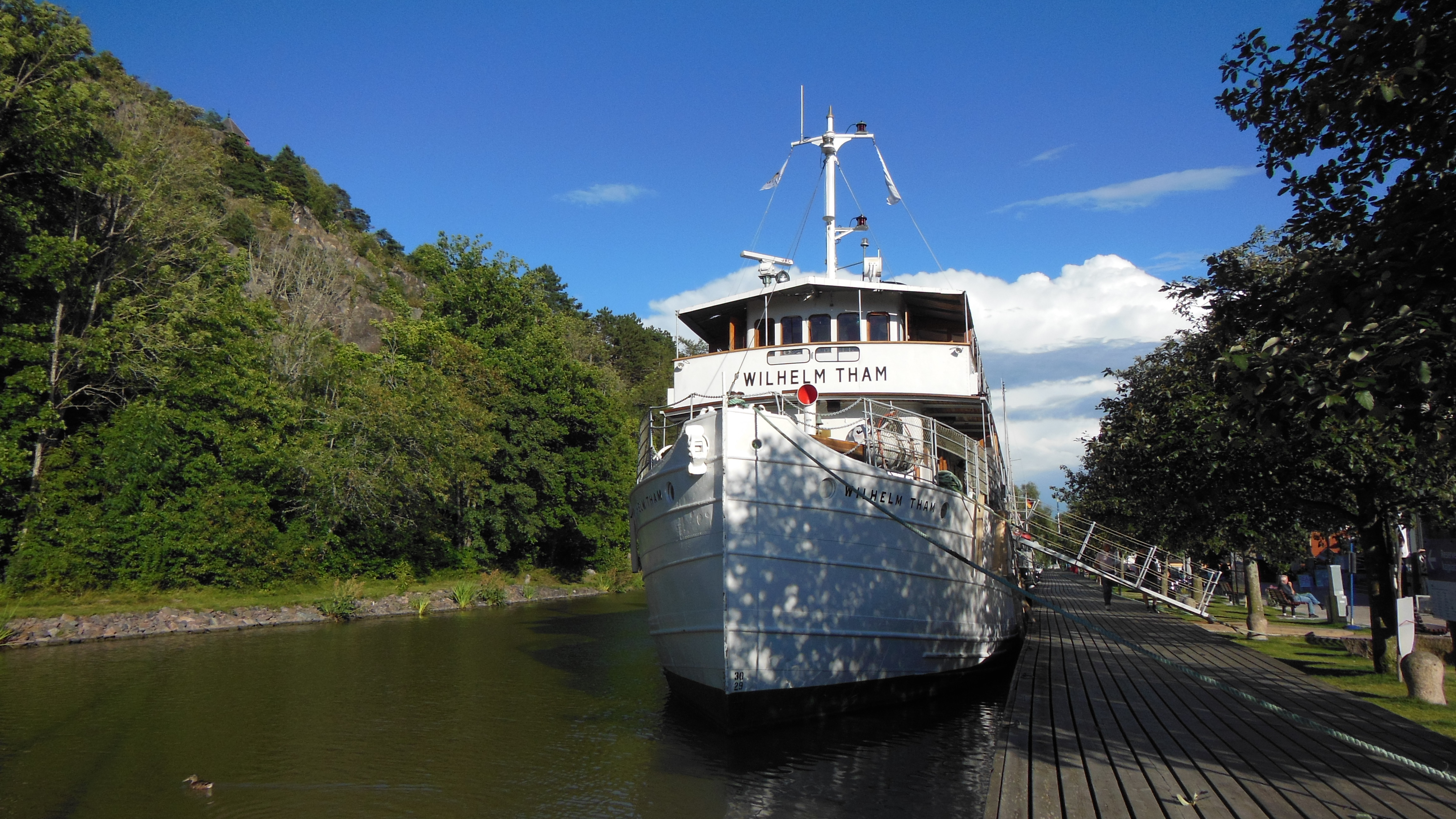 Zum Übernachen macht die Wilhelm Tham (Bj: 1912) in Söderköping fest Es ist das zweitältest von drei Schiffen der Götakanalflotte